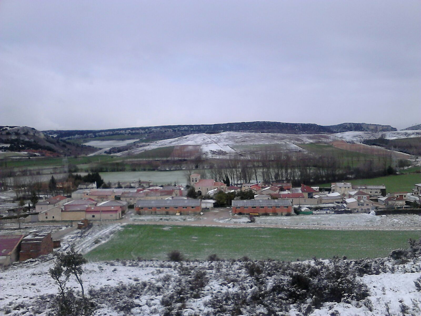 Vista Robredo-Temiño